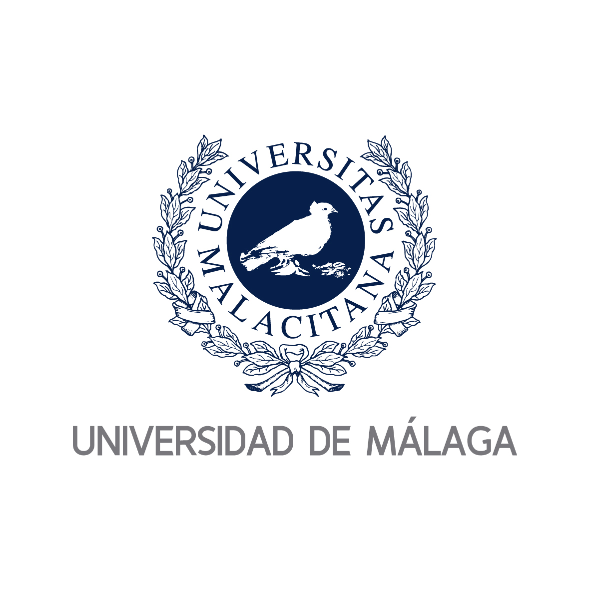 Universidad de Málaga